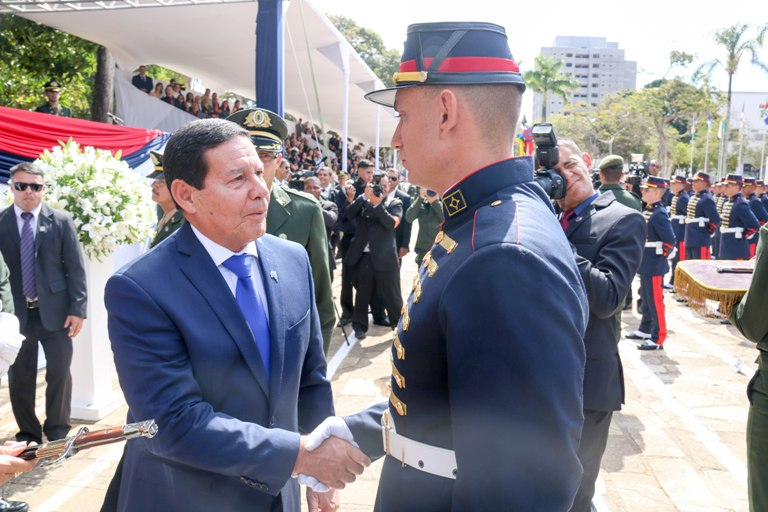 Aluno Péricles, C Com, primeiro a receber o Sabre Sgt Max Wolf Filho